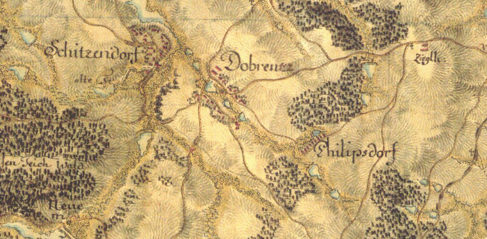 Dobronín a jeho okolí - I. vojenské mapování – josefské (1764–1768, 1780–1783).